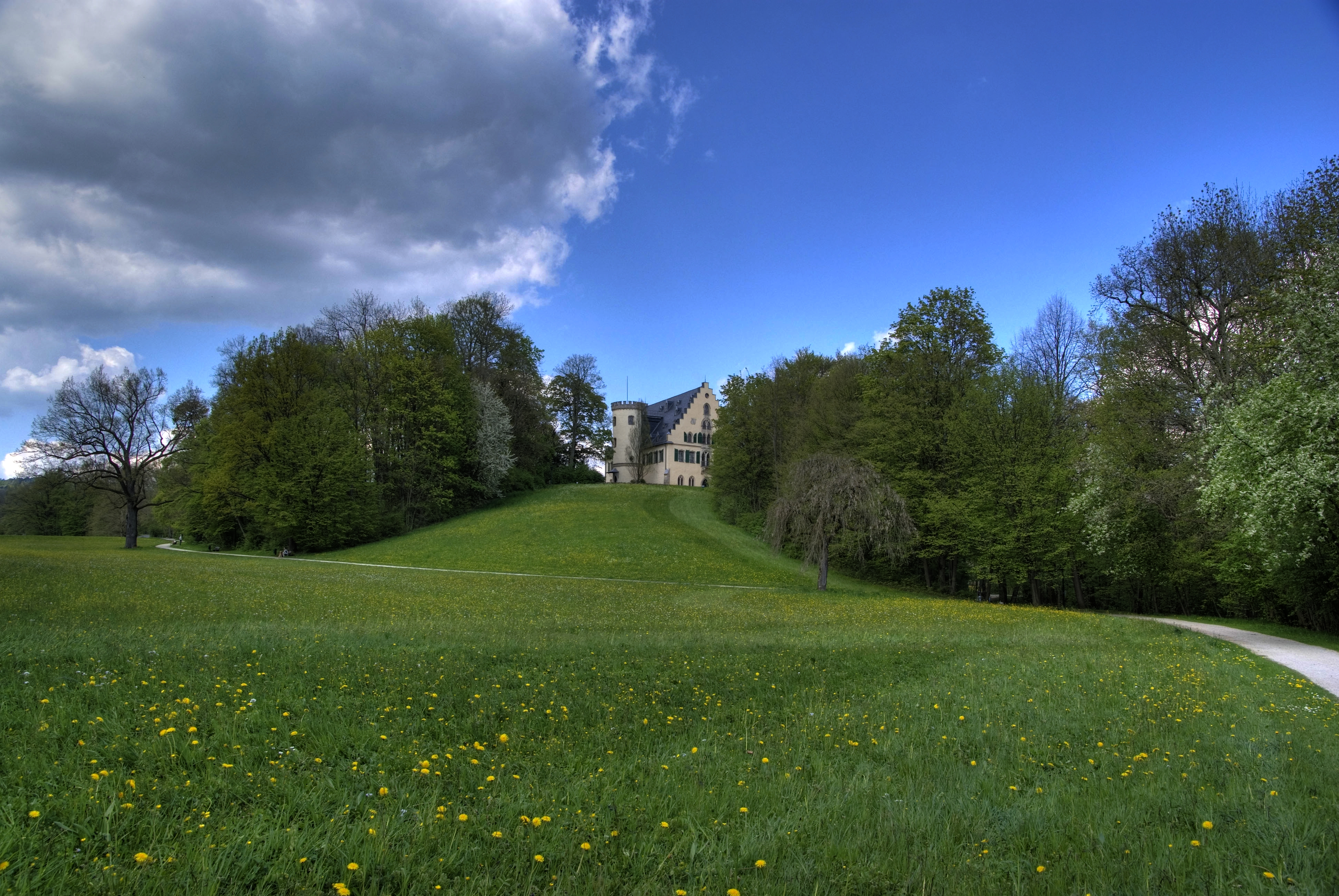 Rosenau mit Landschaft als HDR aufnahme